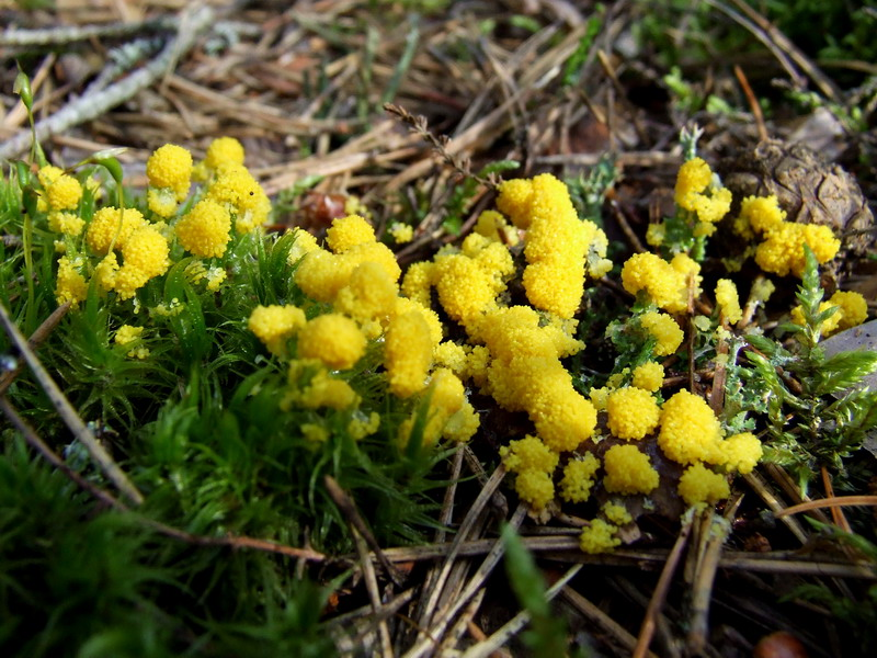 Fuligo septica. Karmėlava forest, Lithuania.